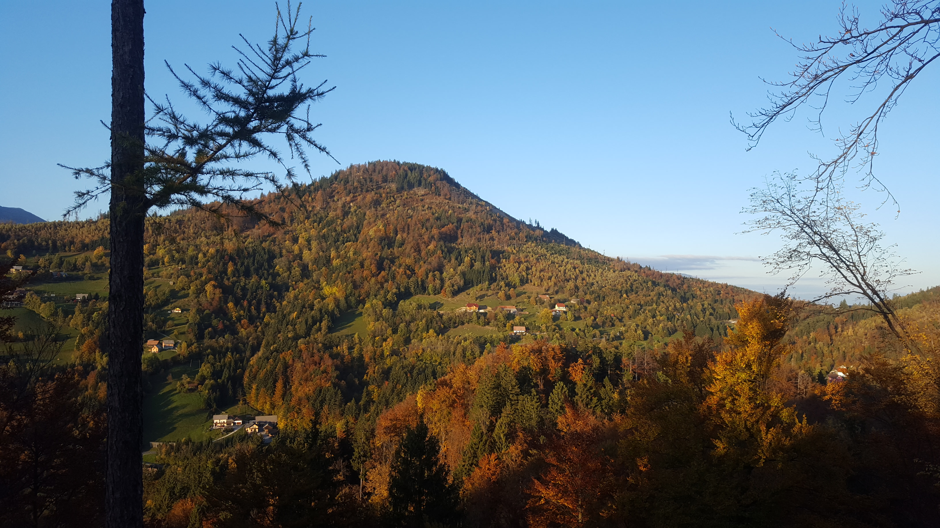 Lom in naselja Kališe (na levi) in Podlom